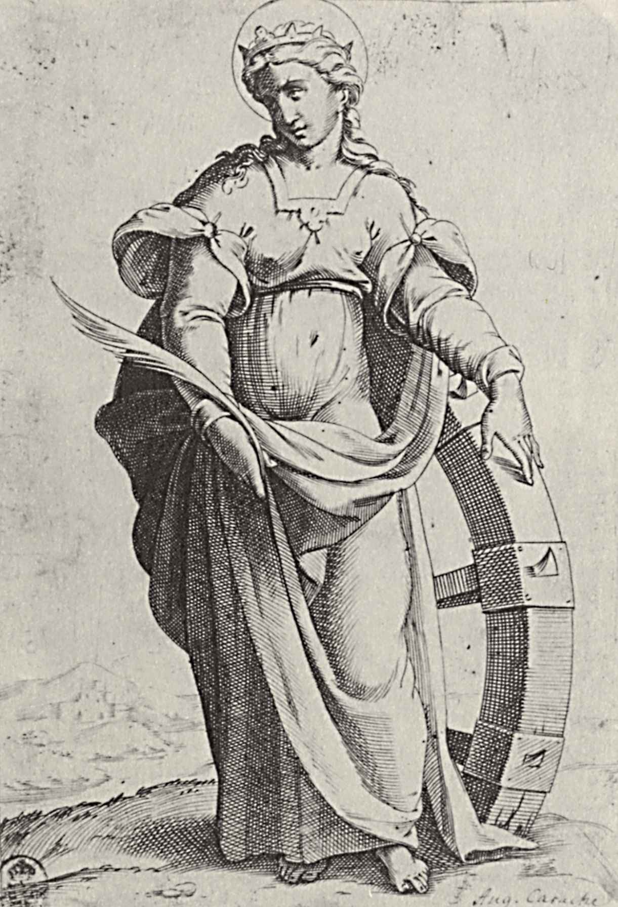 Hl. Katharina, aus der Folge „Heilige Frauen“ Technik: Kupferstich, Maße: 19,2 × 13,1 cm, Sammlung: Staatliche Kunstsammlungen Dresden, Kupferstich-Kabinett Blatt 1 Blatt 2 Blatt 3 Blatt 4 der Folge